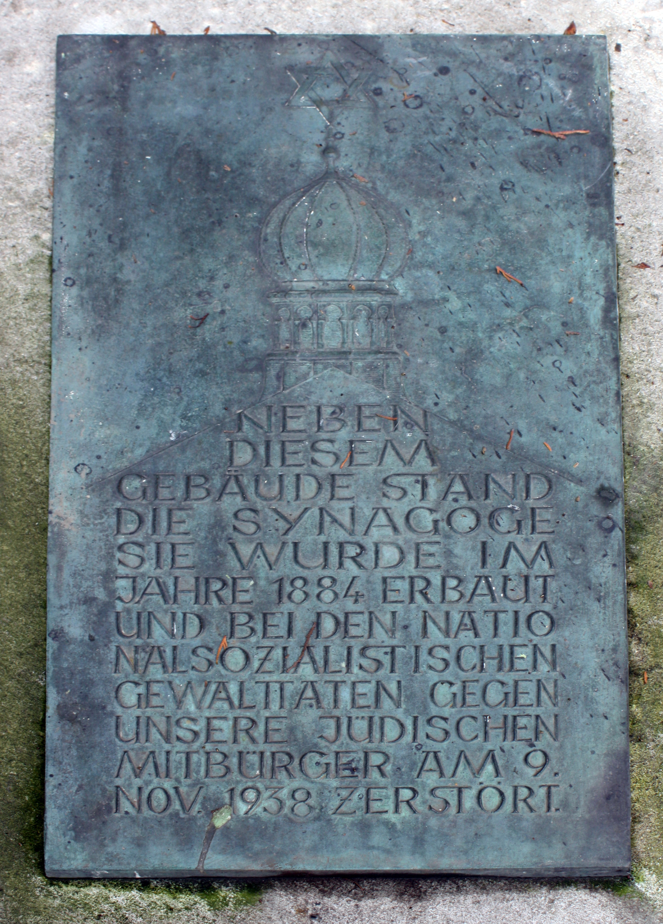 Brühl, ehemaliger Standort der Synagoge in der Innenstadt (1884–1938)